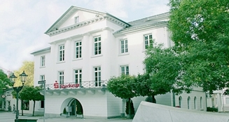 Palais Hamilton der Sparkasse Baden-Baden Gaggenau